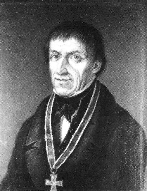 Johann Melchior Mohr in der Porträtgalerie „merkwürdiger Luzerner“ im Katalogsaal der ZHB Luzern